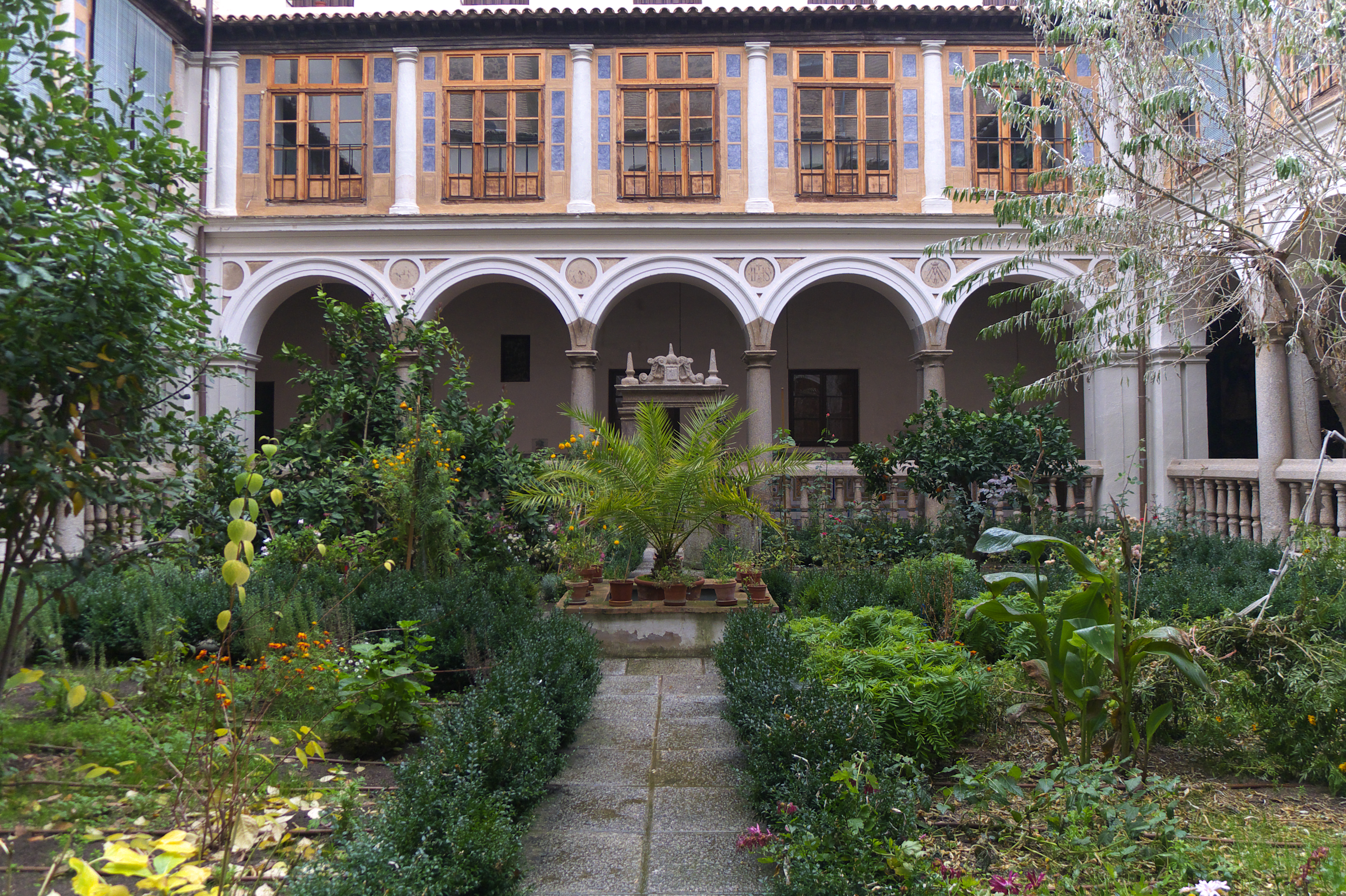 Convento de las Comendadoras de Santiago. Claustro trazado por Diego de Alcántara, buen conocedor de la arquitectura de Herrera, y ejecutado por Diego de Velasco (1565)